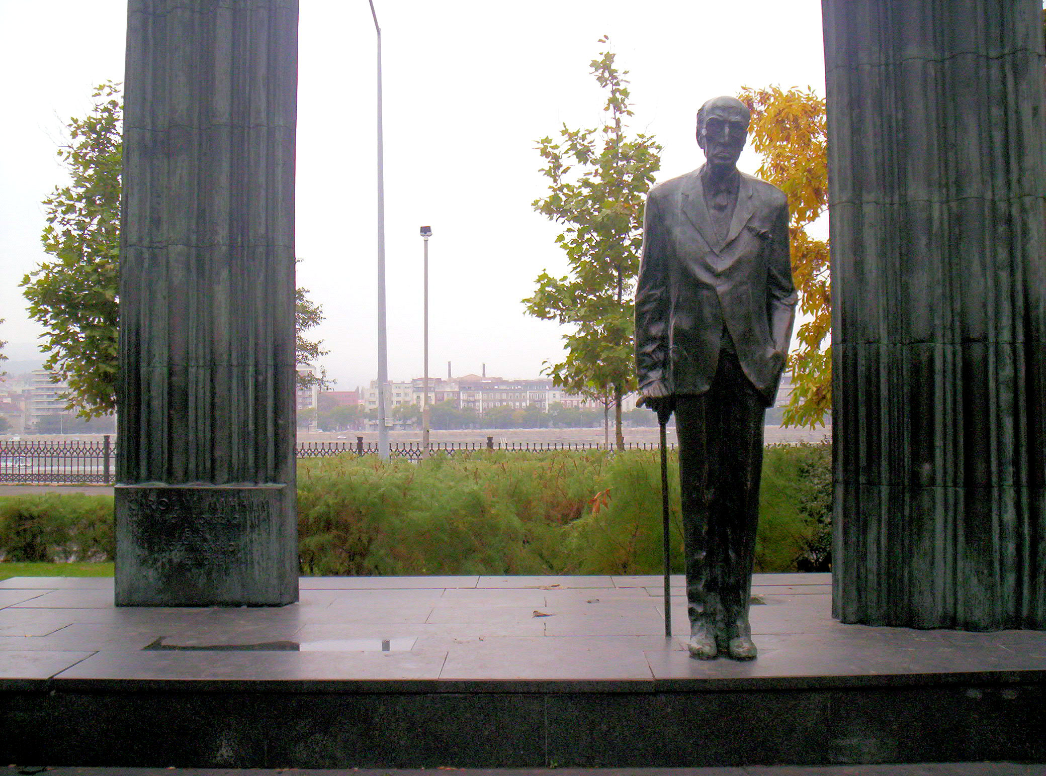 Károlyi Mihály szobra Budapesten. Varga Imre alkotása (1975)